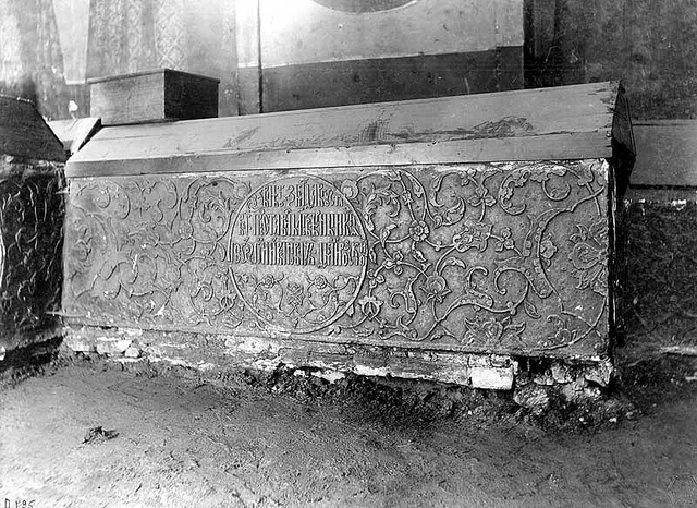 Архангельский собор. Вид на боковую сторону надгробия кн. Георгия Ивановича Дмитровского (1483-1509). Надгробие расположено у северной стены у лопатки. Фотография К.А.Фишера. 1905 г. Из коллекций музея архитектуры им. А.В.Щусева. Инв. номер КПоф 4866-60, 61.